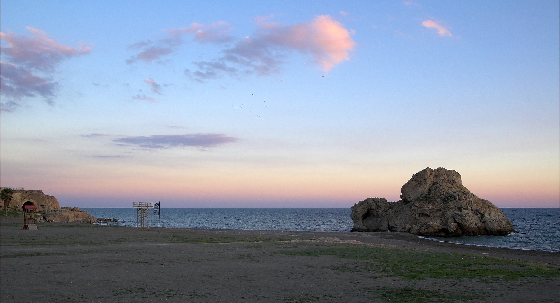 Playa del Peñón del Cuervo